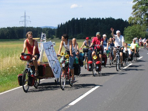 Tour de Natur - die Spitze des Demonstrationszuges